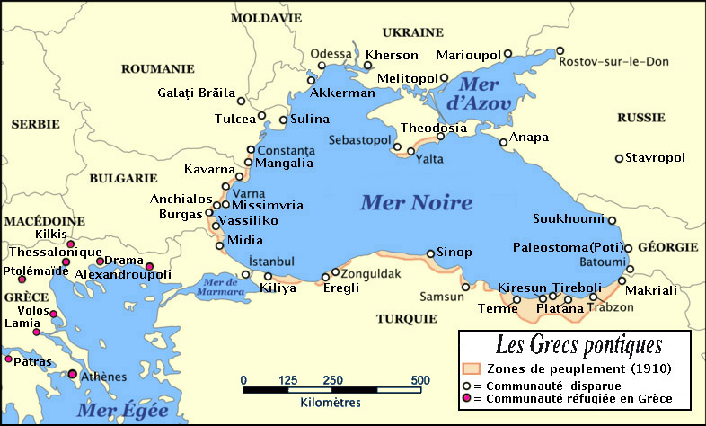 Les grecs pontiques, d'après la biblio de l'article et d'après un fond de carte de Norman Einstein francisé par Idarvol et modifié par moi.